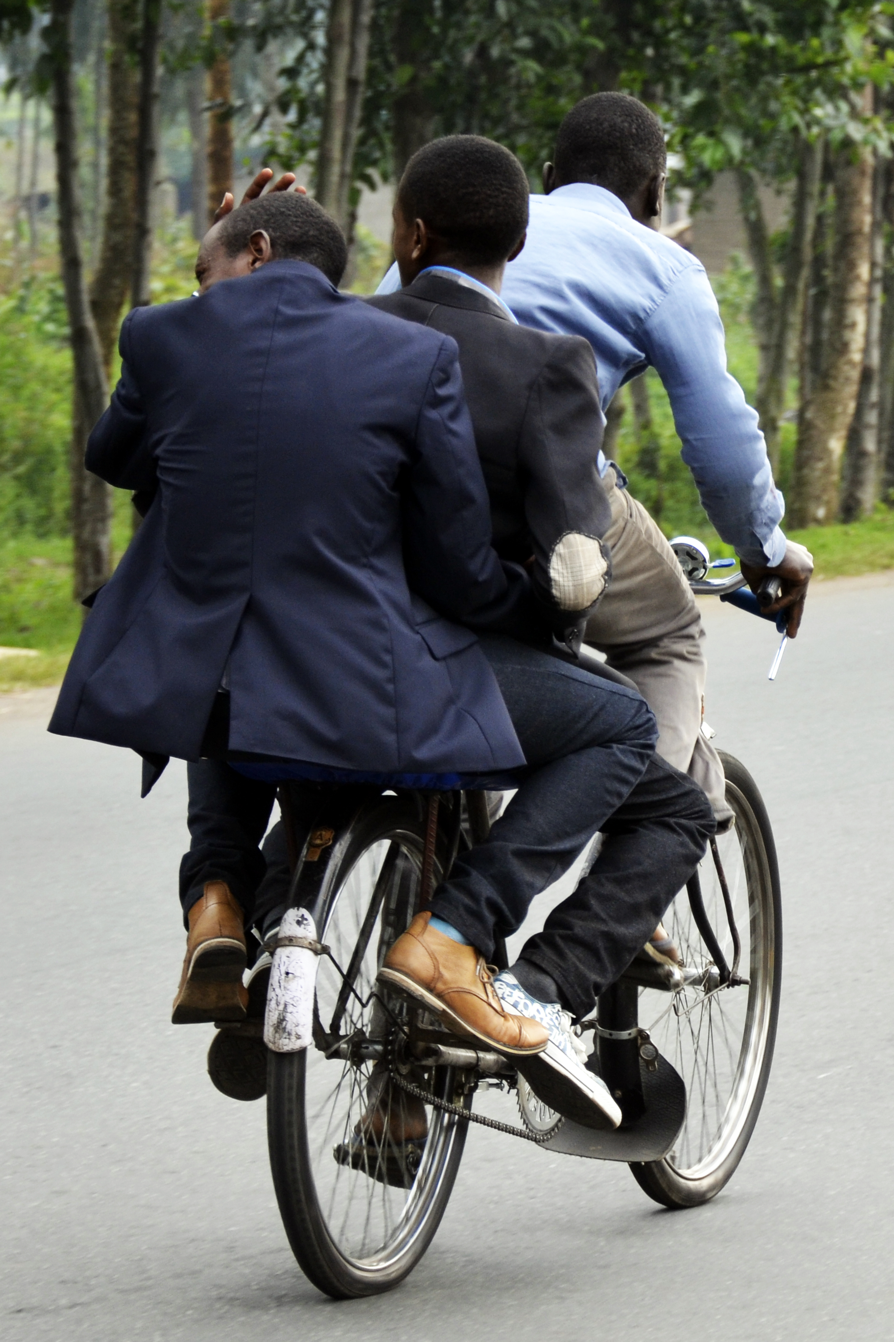 Un vélo taxi avec deux passagers en costume This is an image with the theme "Africa on the Move or Transport" from: Cameroon